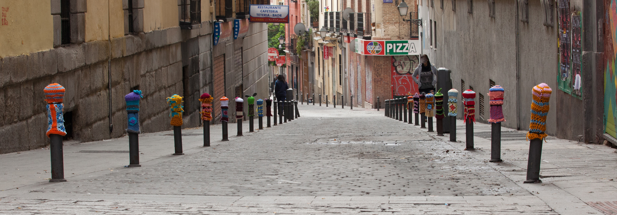 Bolardos en la calle Lavapies de Madrid